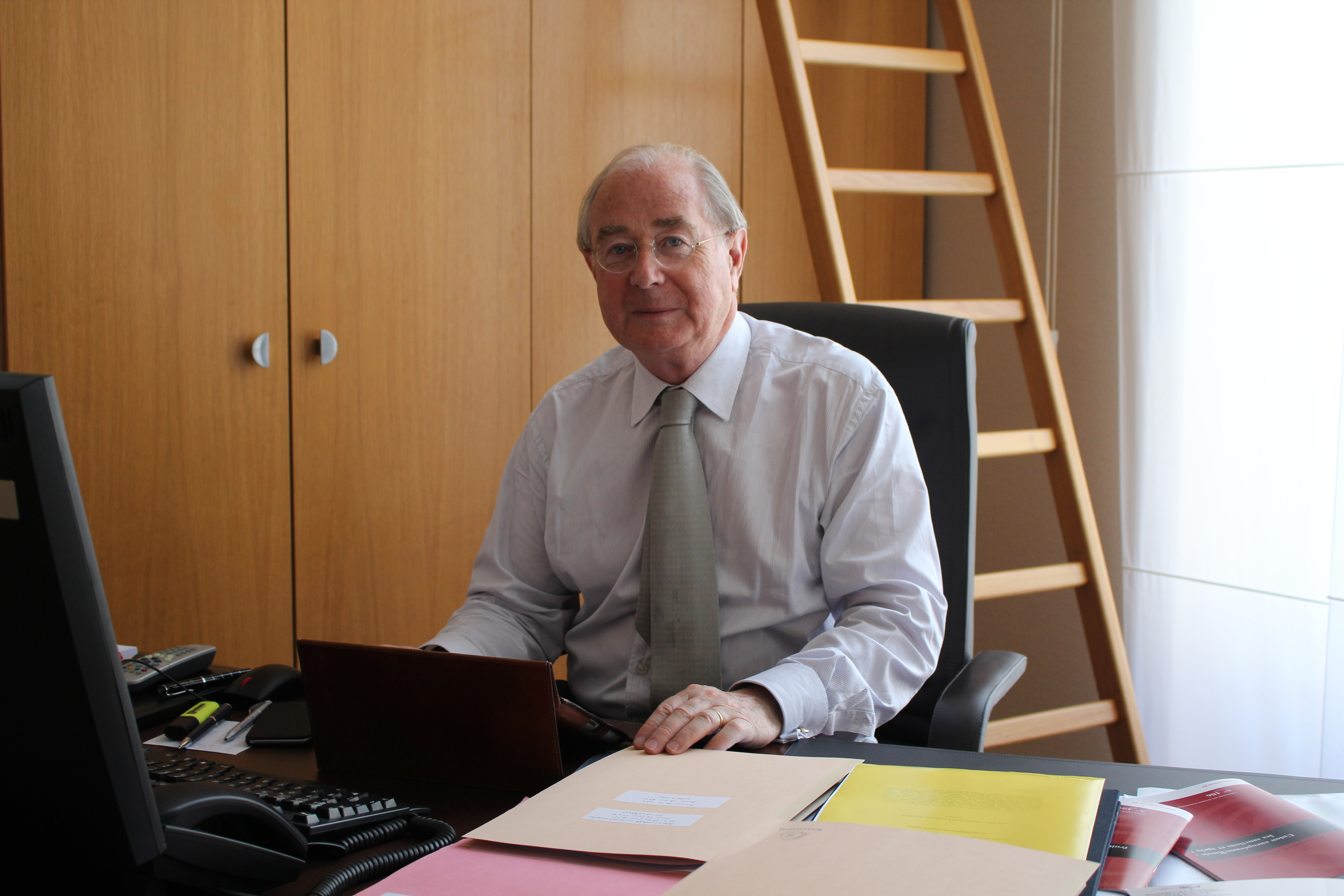 Jean Bizet